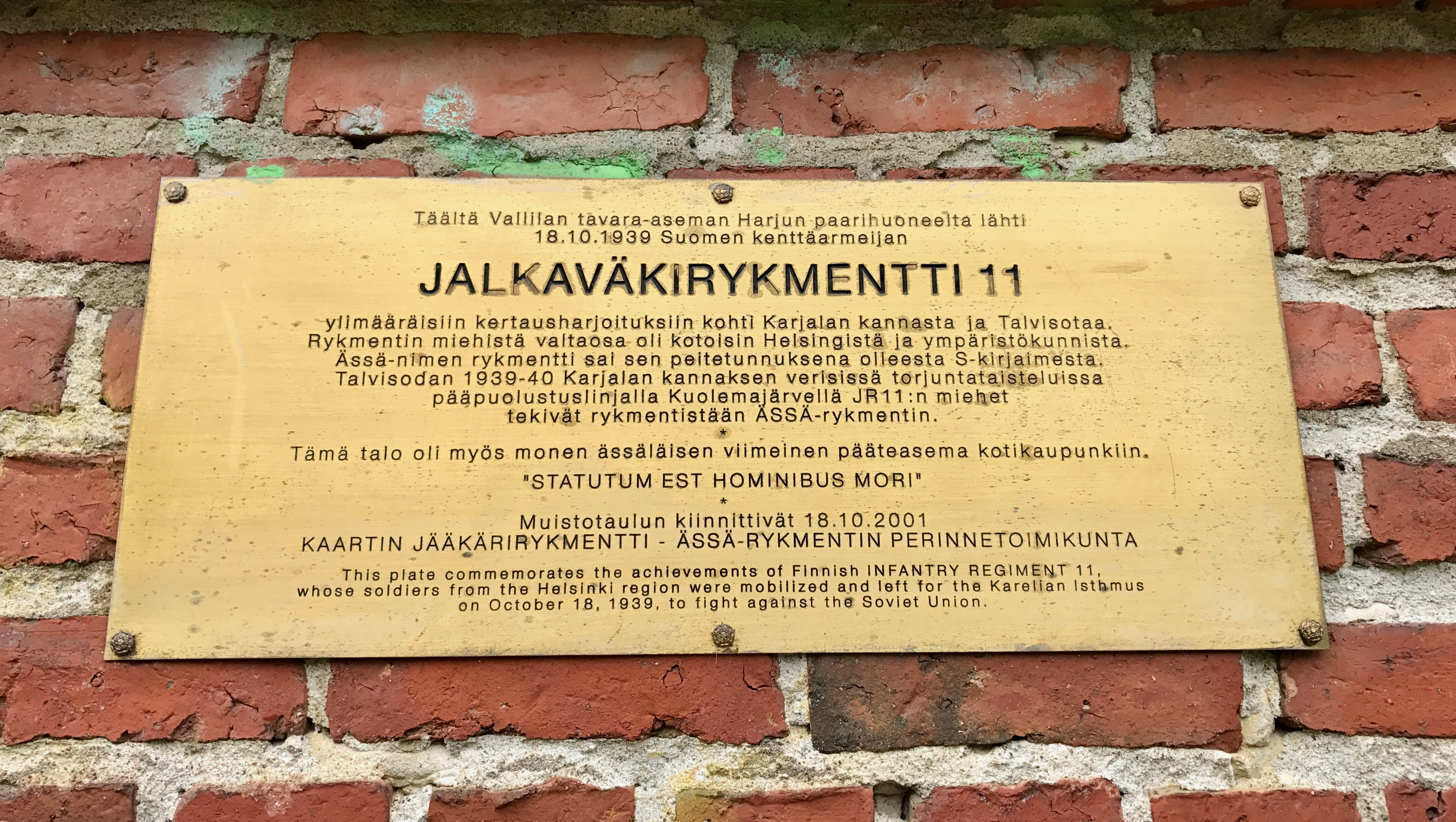 Valokuva talvisodan JR11:n muistotaulusta. Sijainti Harjun paarihuone, Helsingin Vallila.